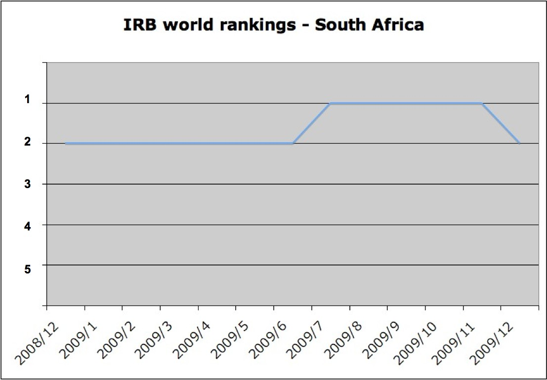 Own work